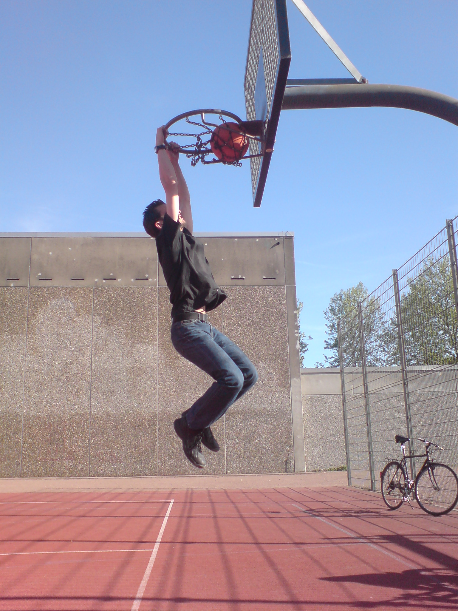 ein zweihändiger Dunk